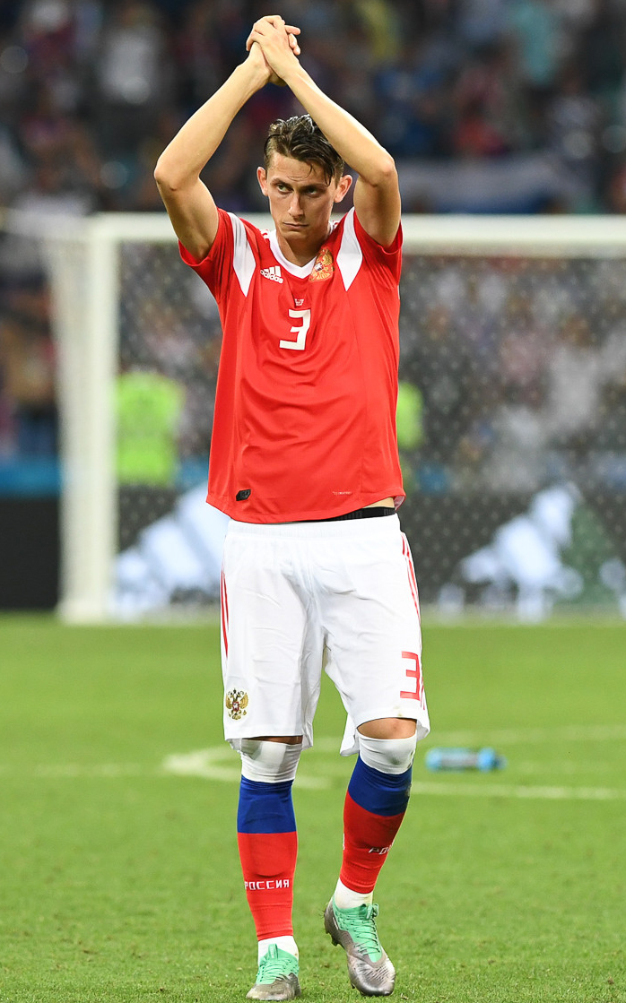 Сборная России заканчивает ЧМ-2018 с поднятой головой. Хорватия выходит в полуфинал